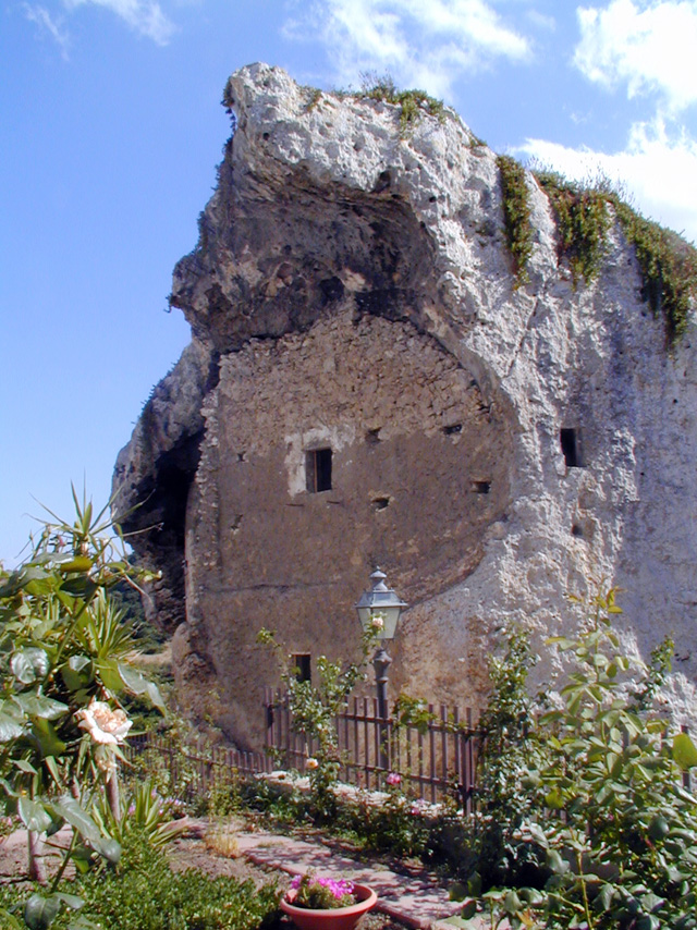 La Domus de janas: vista da Est